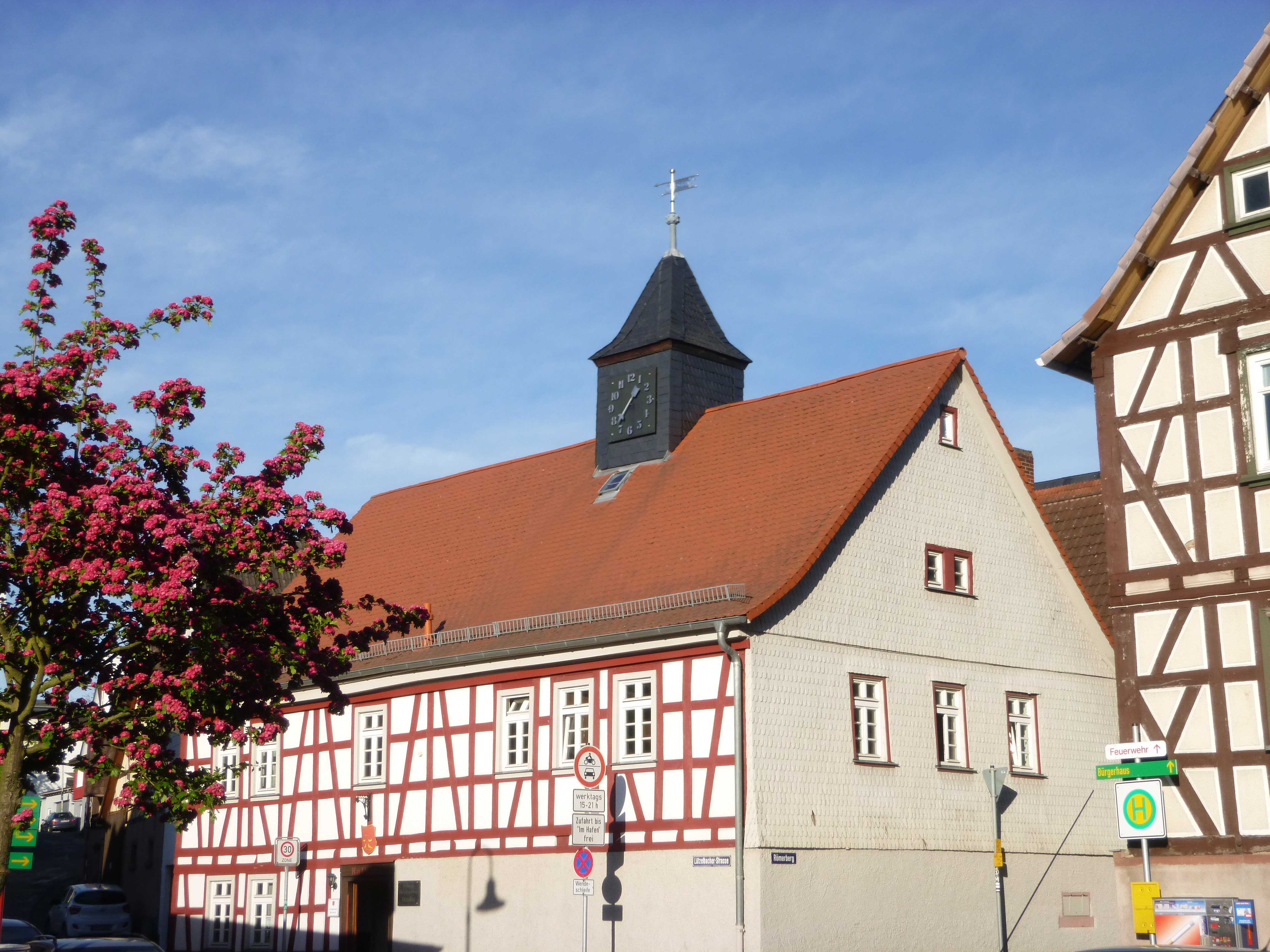 Historia Rathaus de Brandau, administra sidejo de la komunumo Modautal en Hesio, Germanio.